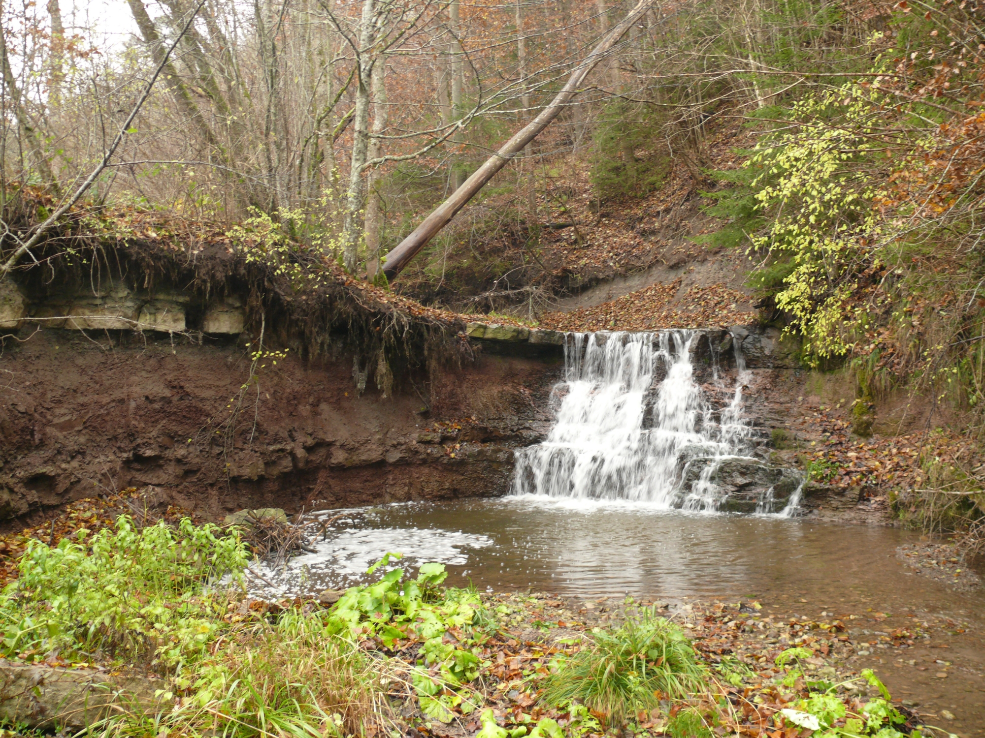 Kleiner Wasserfall im Eisbach, NNW Sulzbach-Laufen